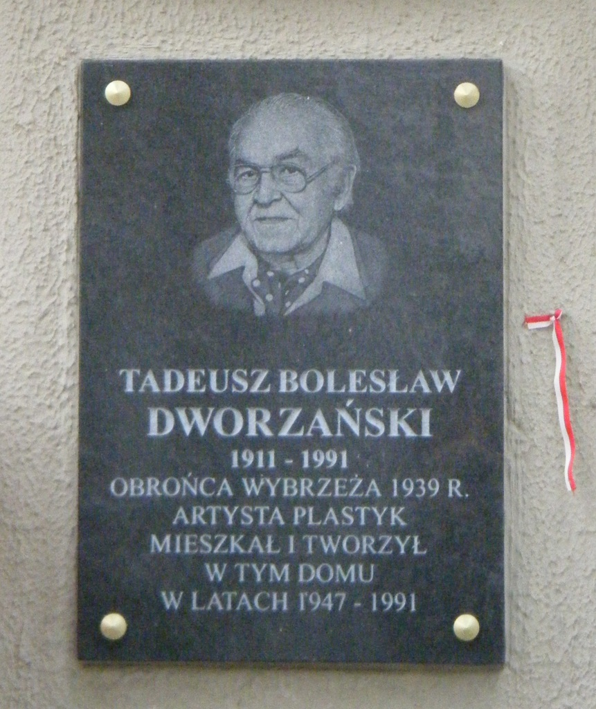 Tablica upamiętniająca Tadeusza Bolesława Dworzańskiego. Warszawa, Saska Kępa, ul. Francuska 43.